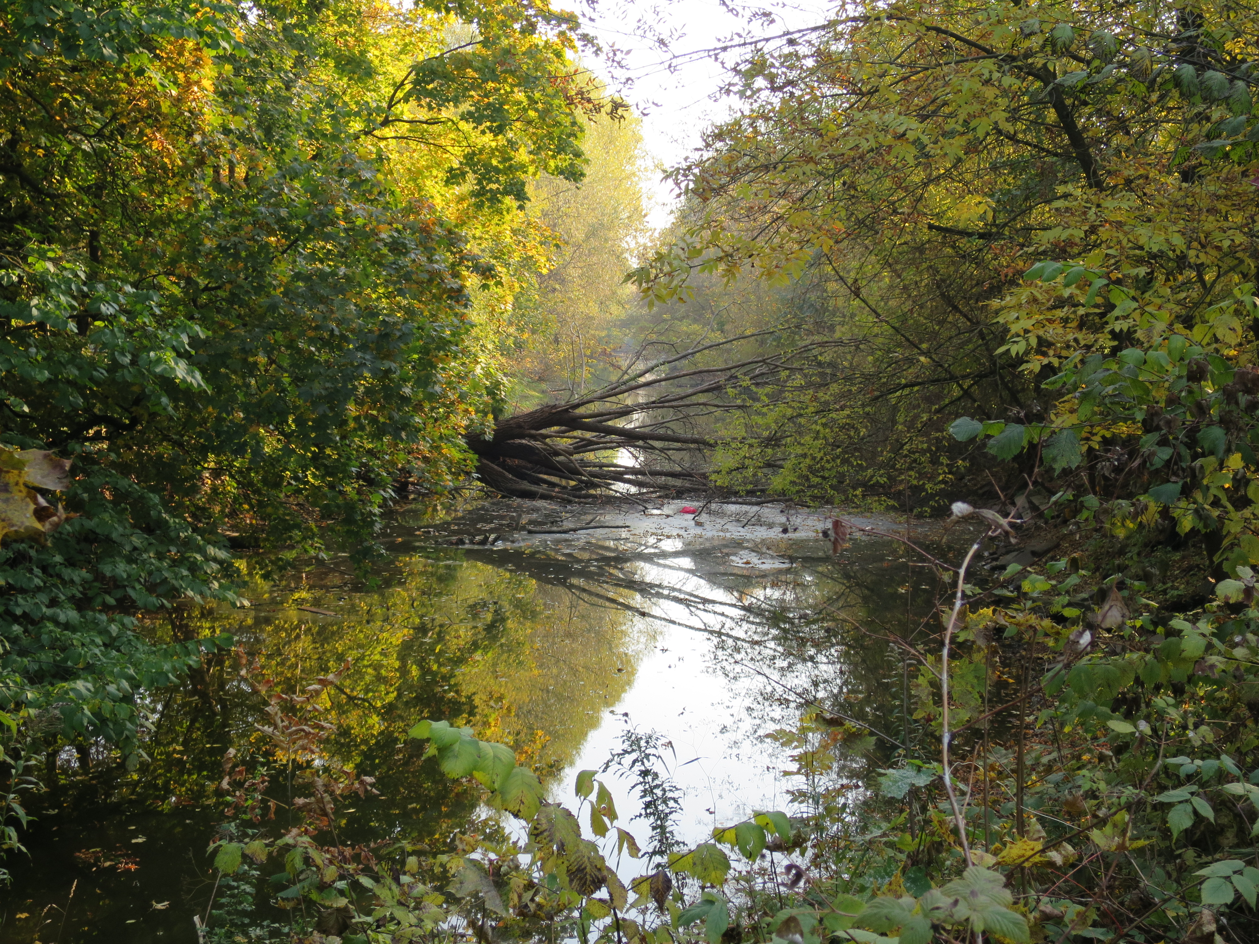 Kīleveina grāvis pie Jelgavas ielas